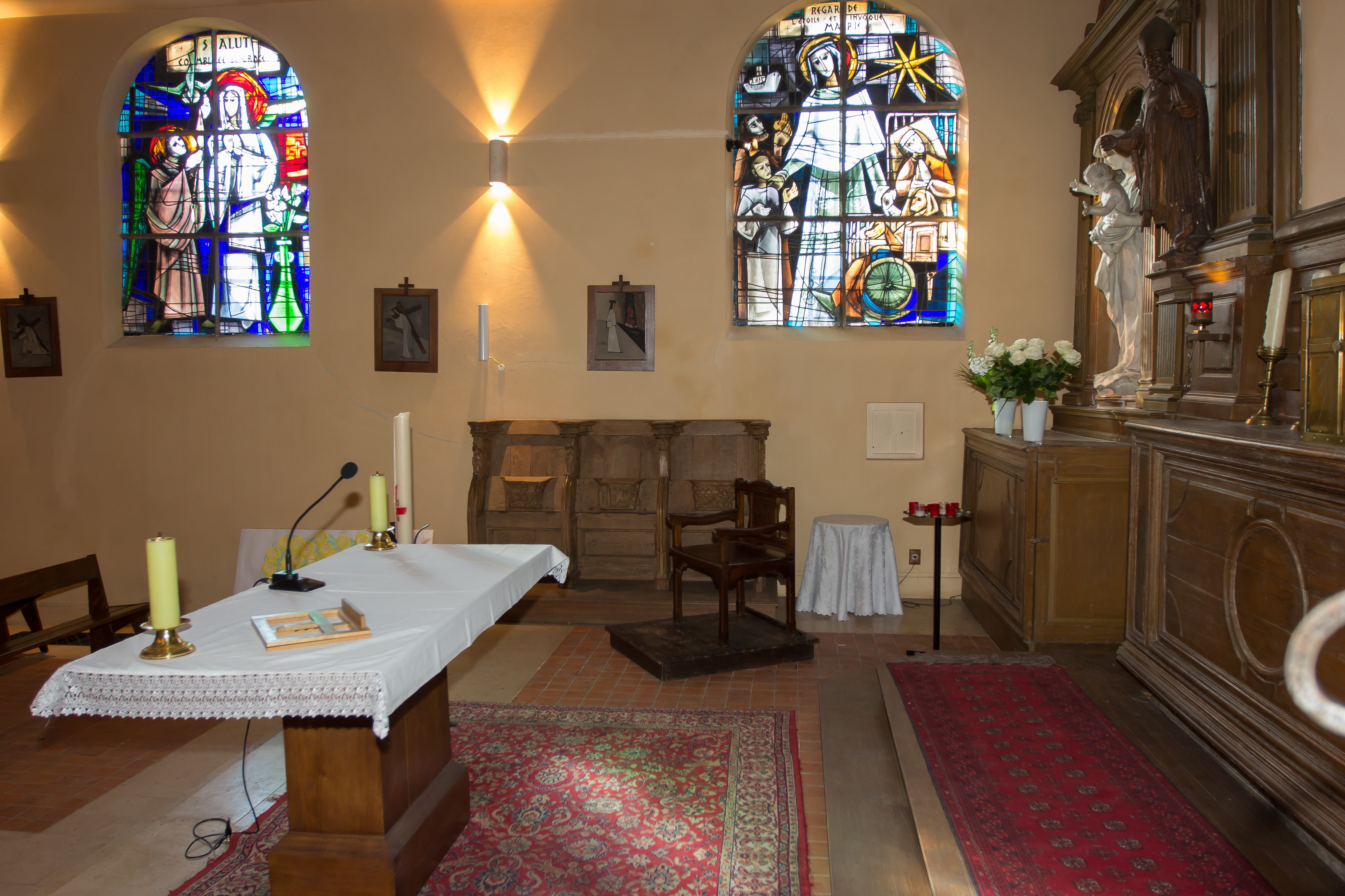 Intérieur de l'église de Villabé / Villabé / Essonne / France